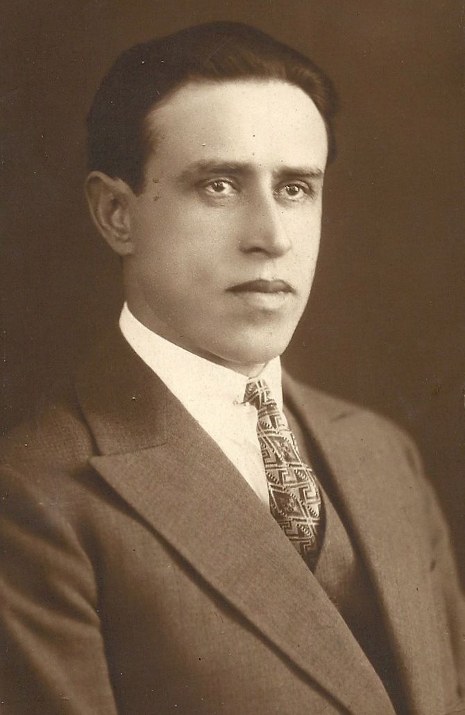 המחנך, הסופר, ההיסטוריון והמתרגם יעקב לוי כפי שצולם ב-1930 בבולגריה בעת כהונתו כמפקח על בתי הספר הקהילתיים במדינה מטעם הקונסיסטוריה היהודית של בולגיה.